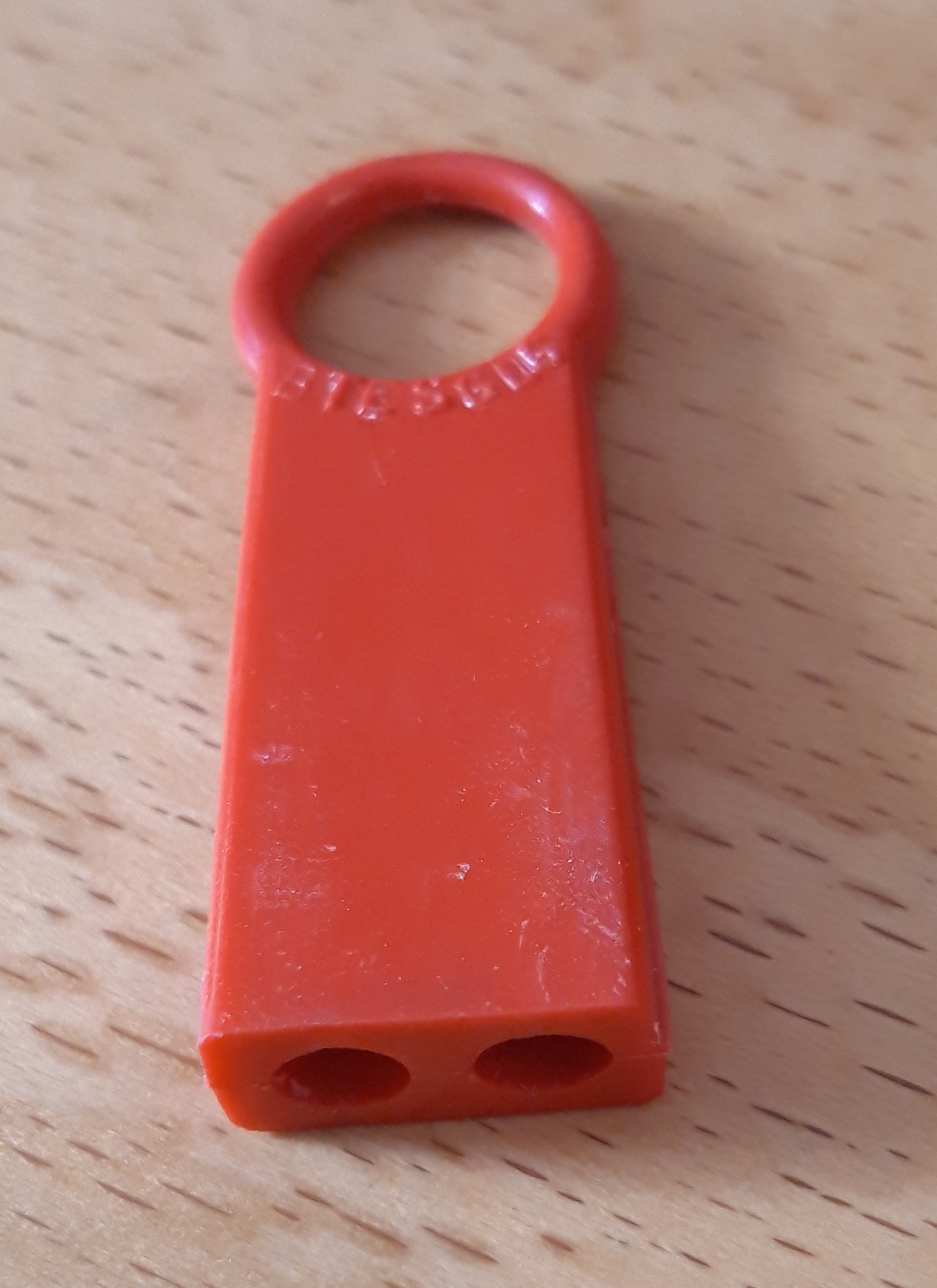 dopje voor breinaalden om het breiwerk te bewaren zodat de steken er niet afvallen